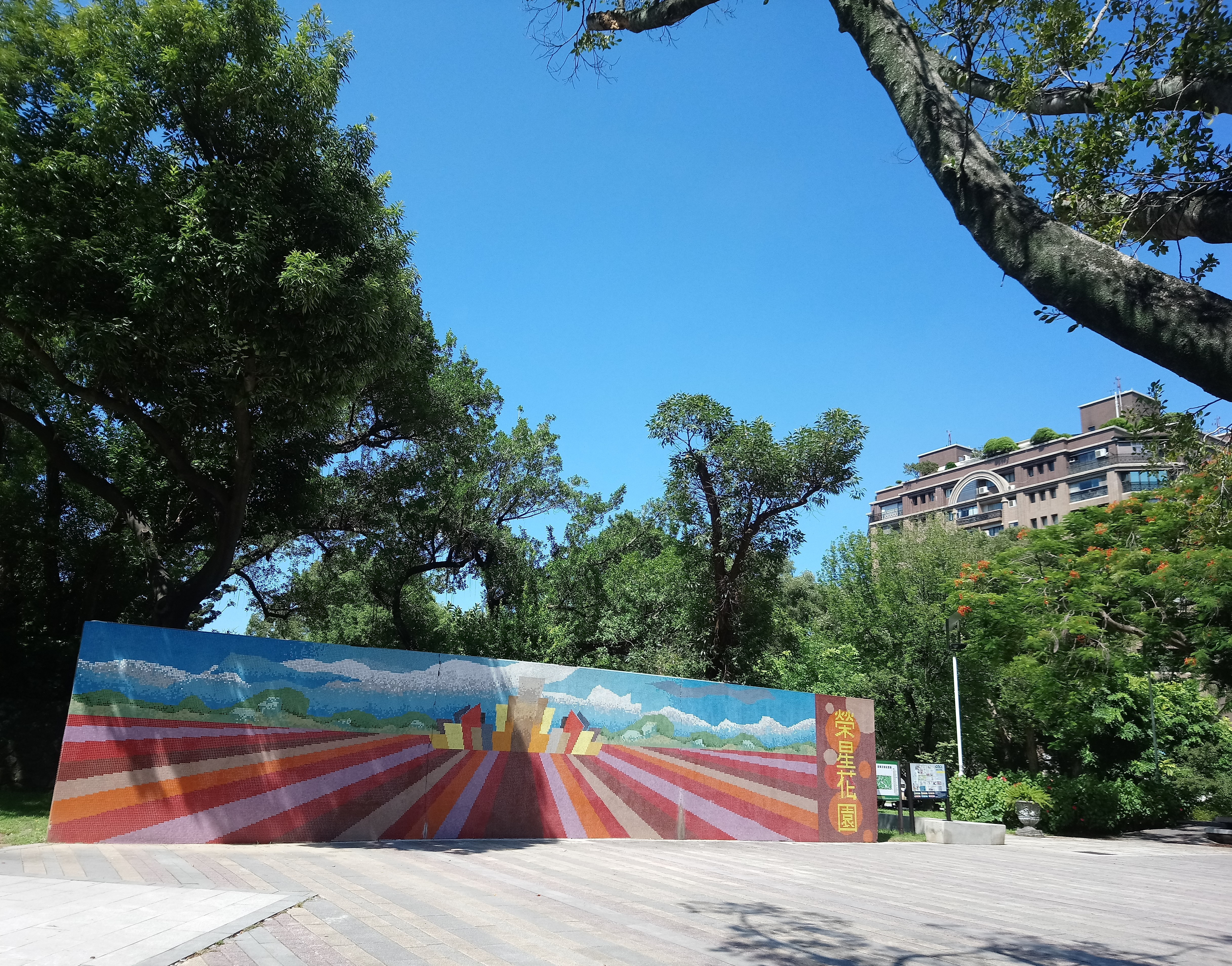 榮星花園公園入口,臺北市中山區下埤頭次分區行仁里